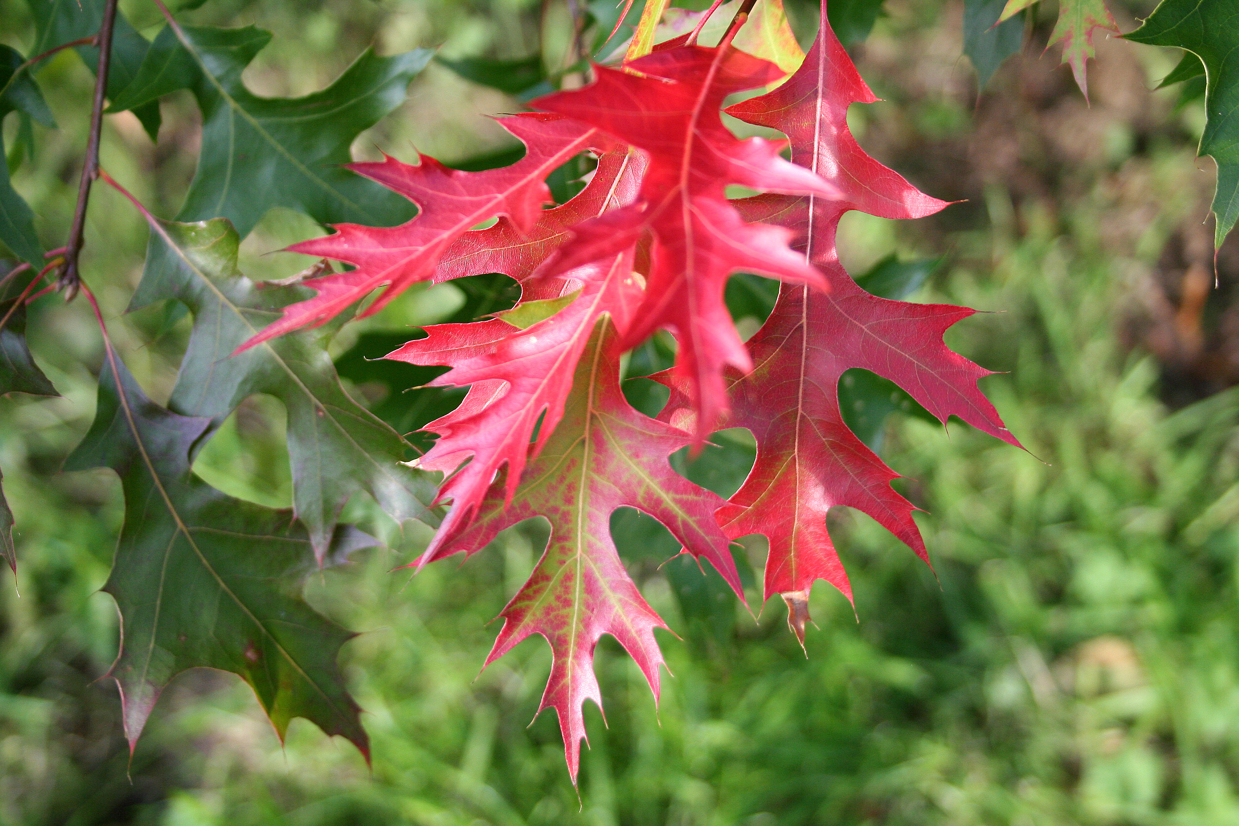 Feuilles du Chêne écarlate - Quercus coccinea Année de plantation : 1993 Position exacte : Arboretum Robert Lenoir (S14A) - Rendeux (Belgique).